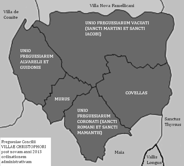 Concilii Villae Christophori freguesiae post novam anni 2013 ordinationem administrativam